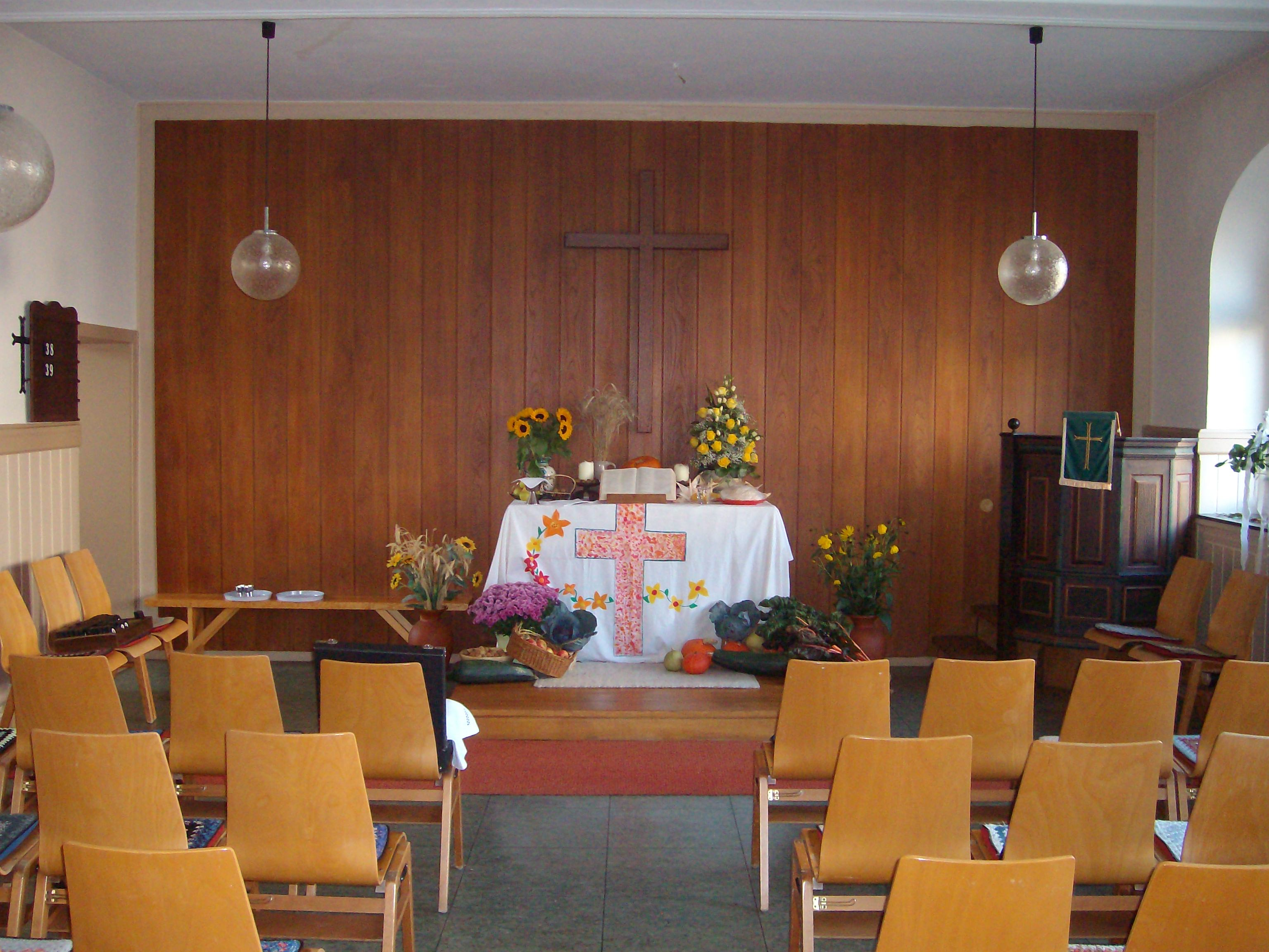 Saal der Evangelischen Kirche Altenhain, Laubach, Landkreis Gießen, Hessen, Deutschland